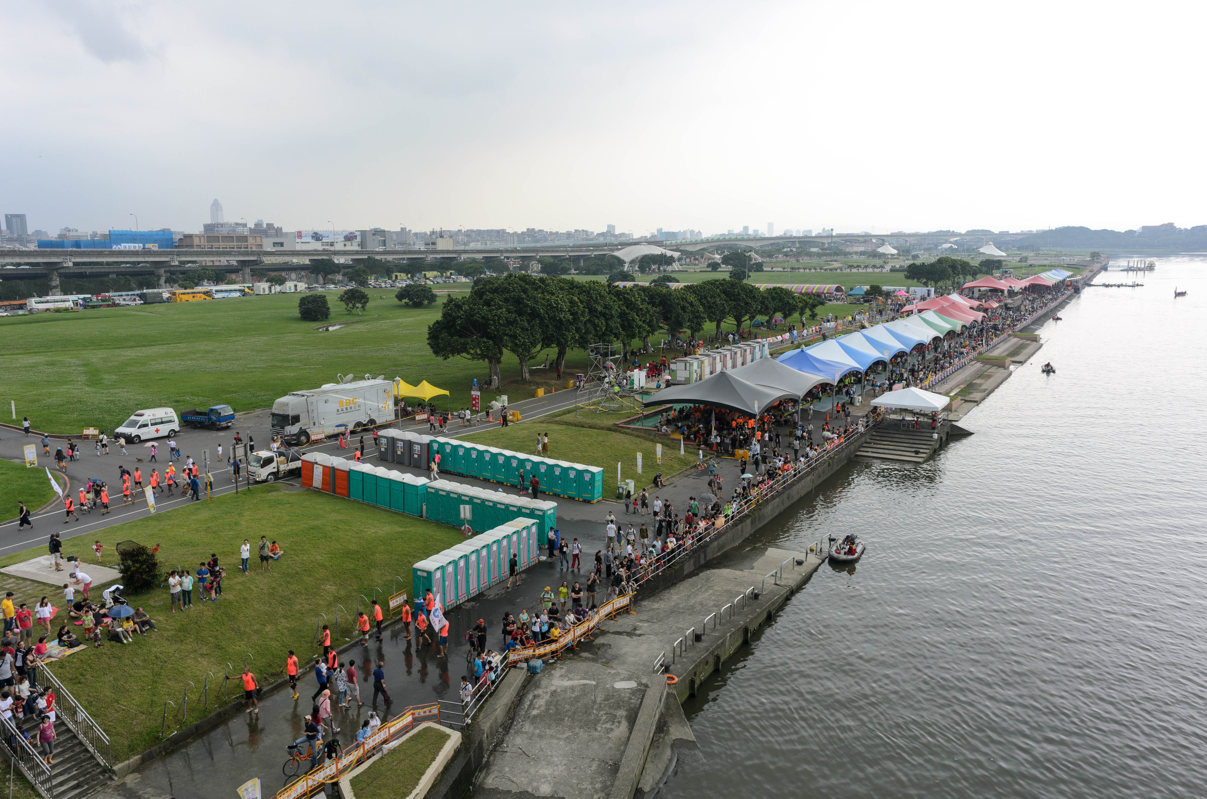 從大直橋西側俯望2017臺北國際龍舟錦標賽期間，設於大佳河濱公園南岸的觀眾席與臨時廁所。